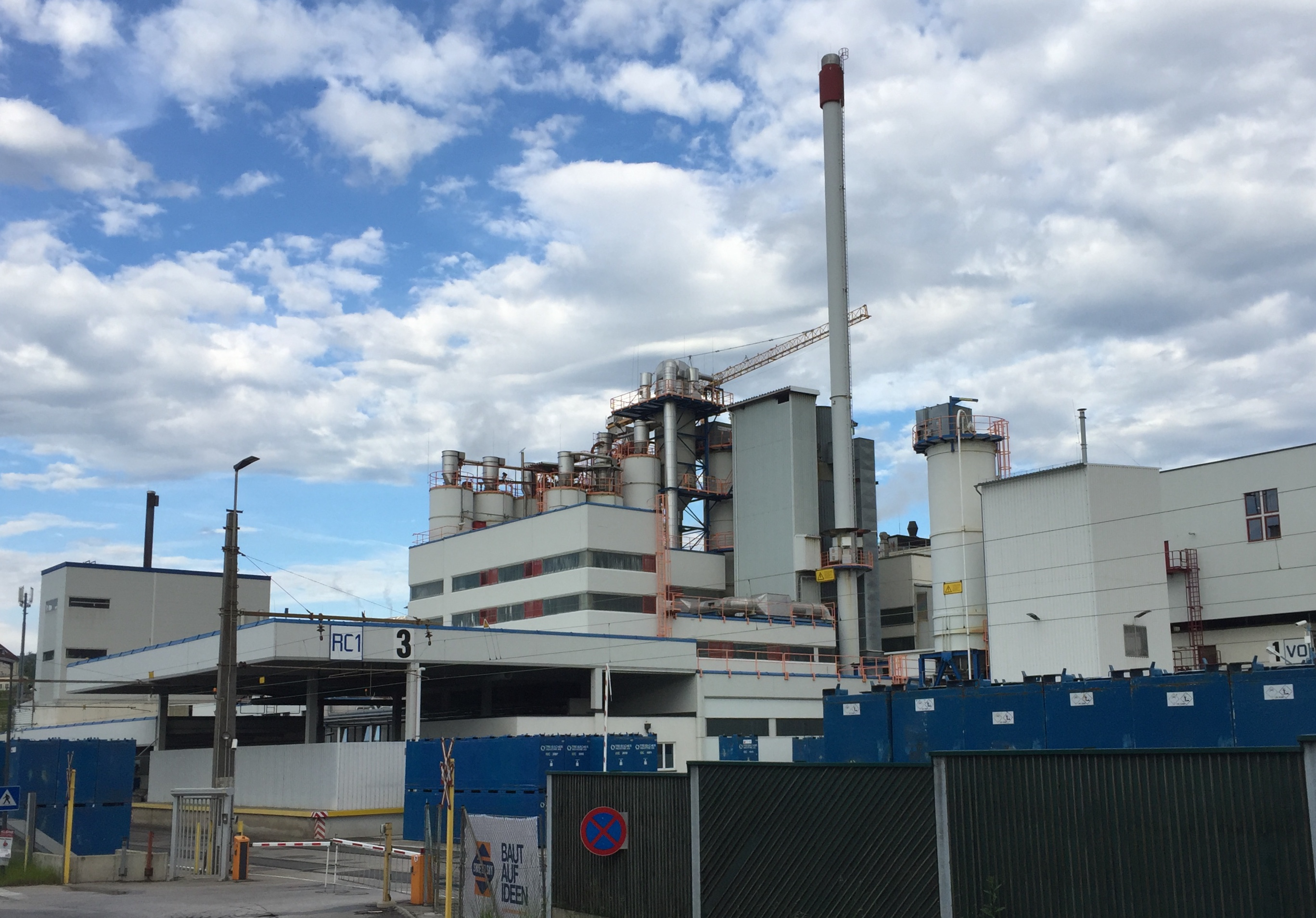 Produktionsanlagen der Treibacher Industrie AG in Althofen